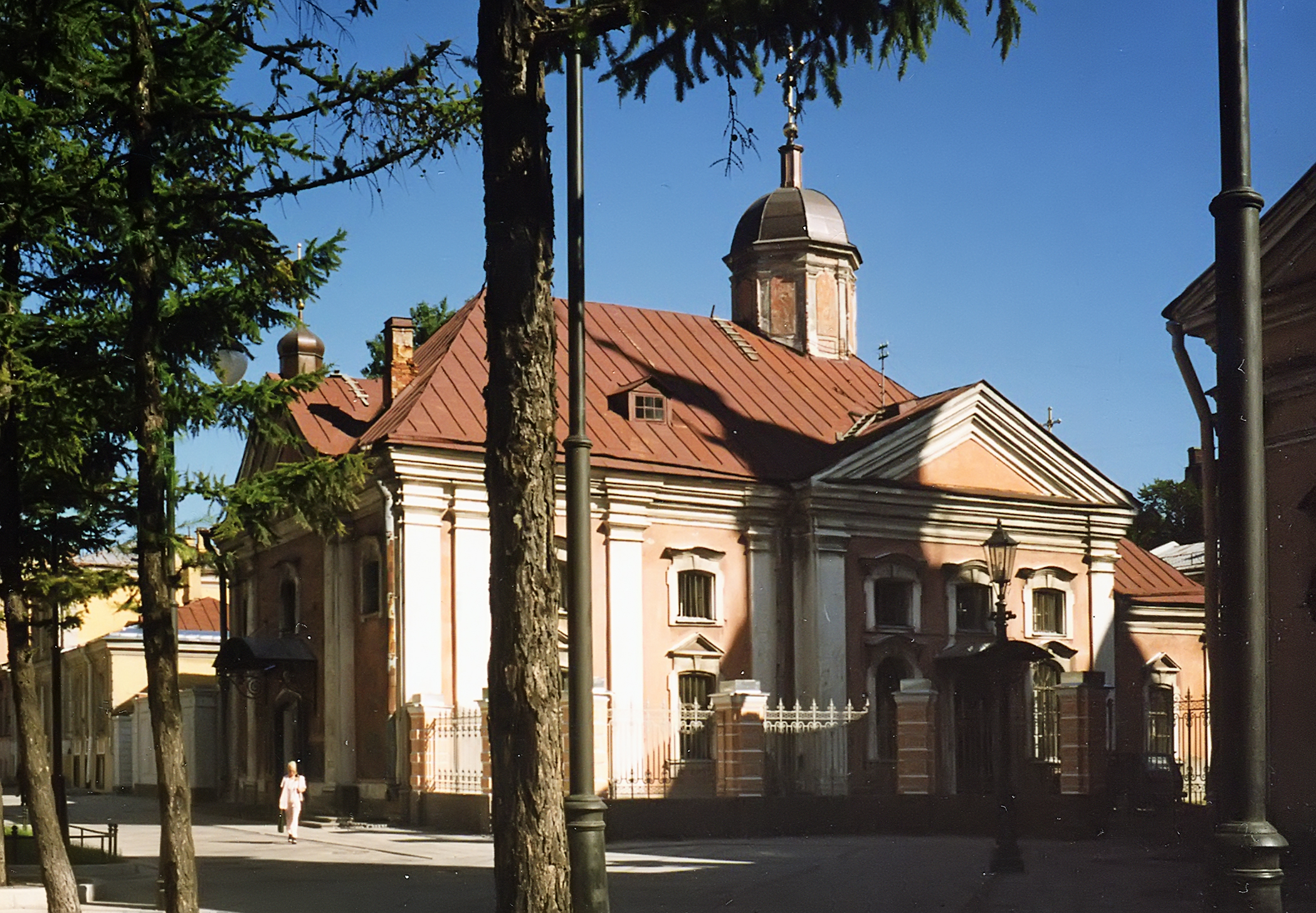 Церковь Трёх святимтелей (6-я линия ВО, 11а)